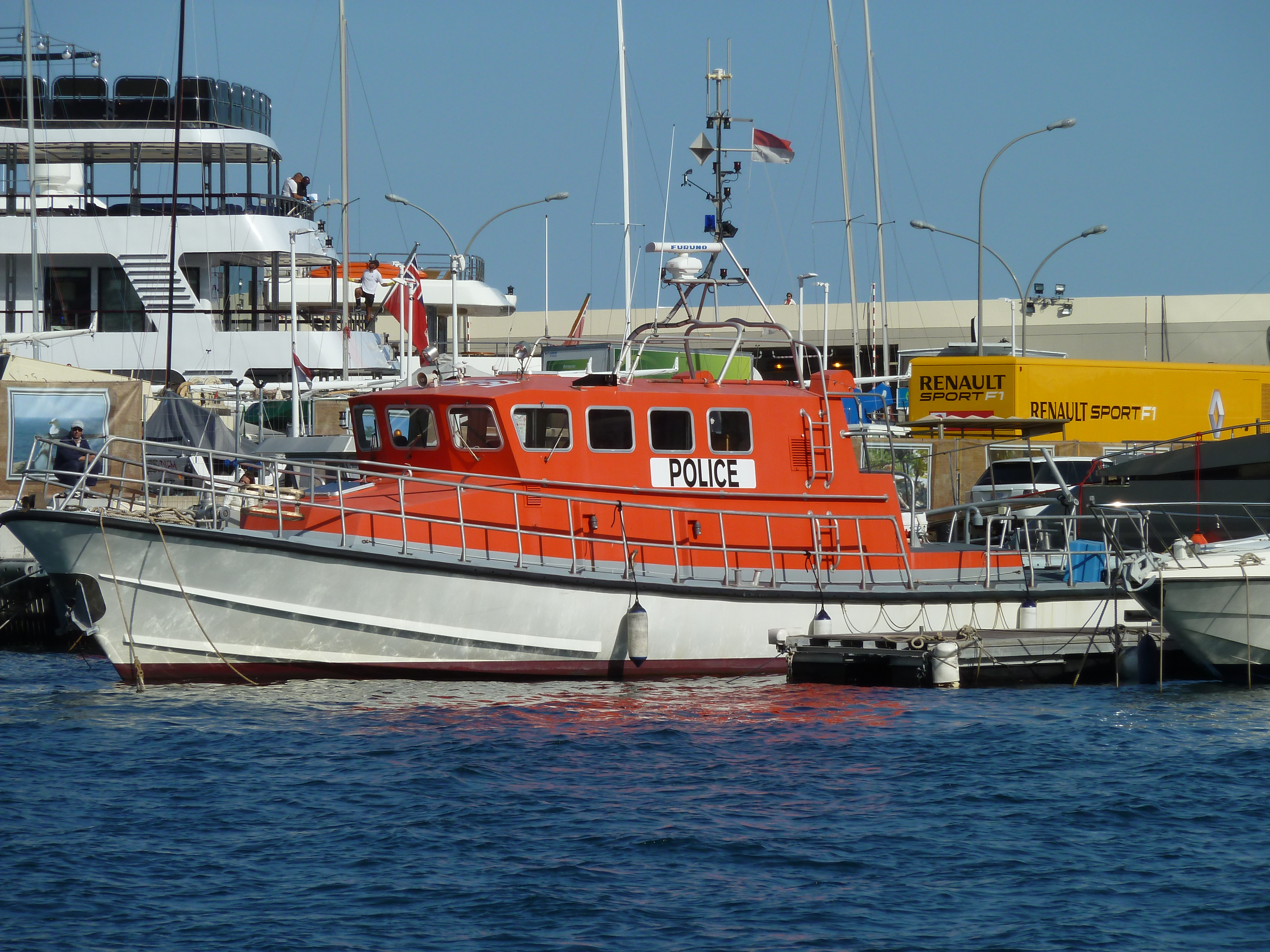 Vedettes côtières de surveillance maritime à Monaco